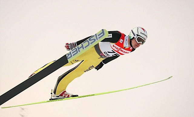 Simon Ammann podczas serii treningowej przed konkursem indywidualnym mężczyzn na Mistrzostwach Świata w Narciarstwie Klasycznym 2011 w Oslo.